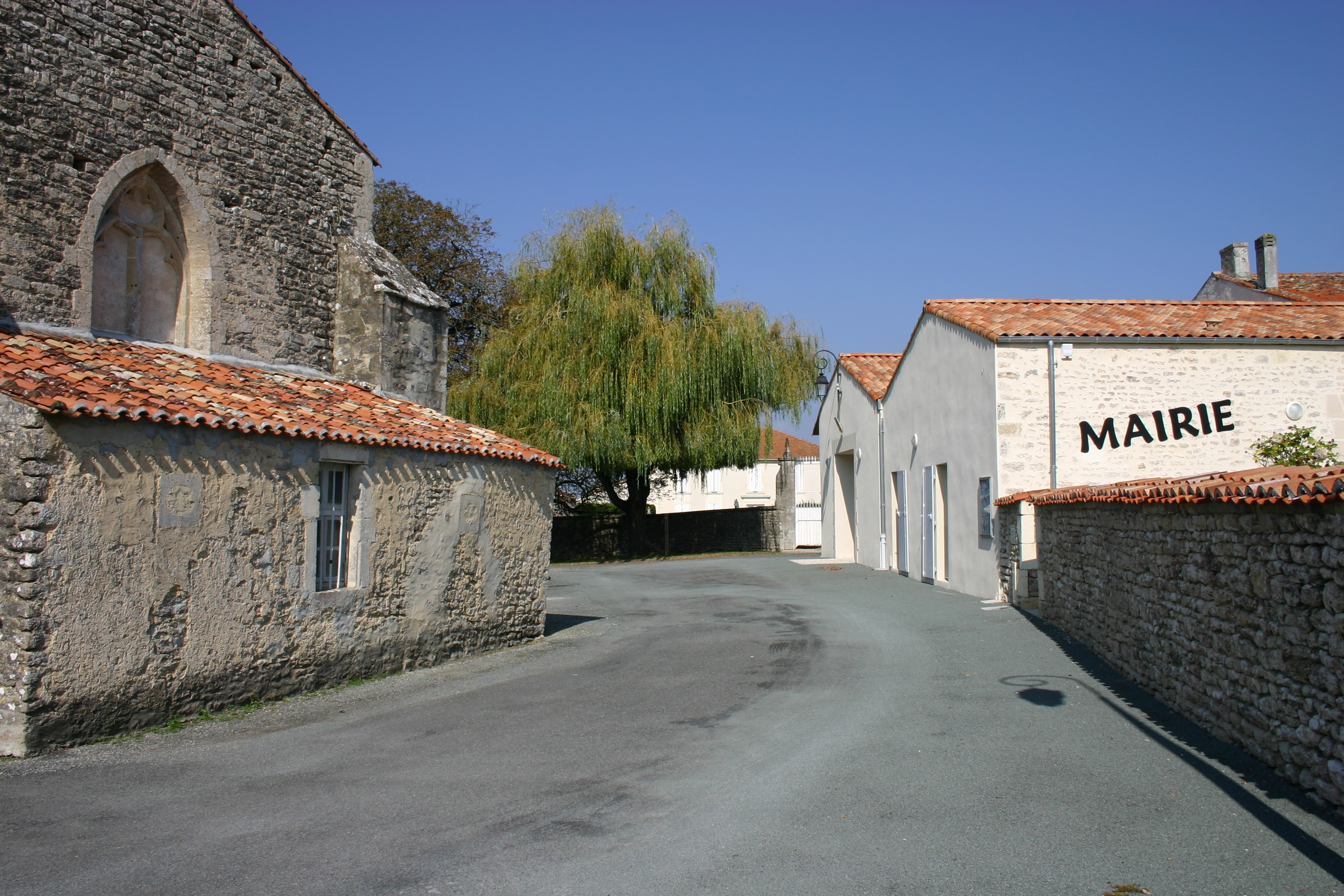 Mairie de Courant (Charente-Maritime)